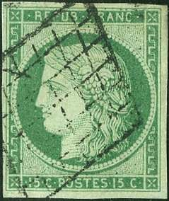 Cérès, premier Émission, 15c vert